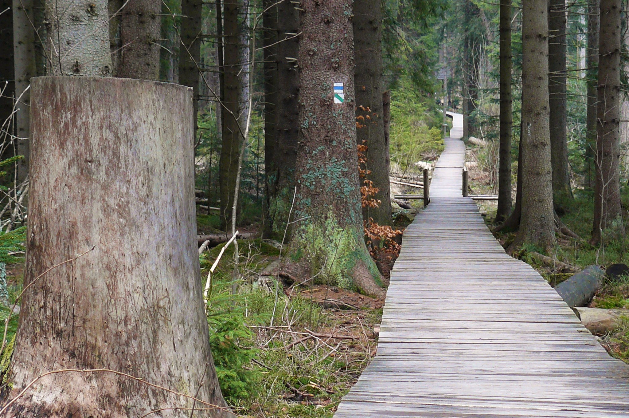 Rejviz - rezerwat przyrody, kładka ze ścieżką dydaktyczną.